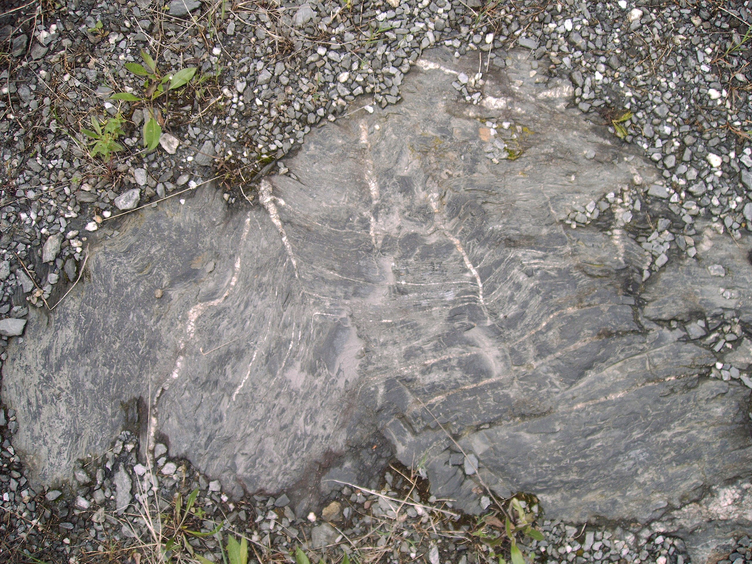 Fałdy ze scinania